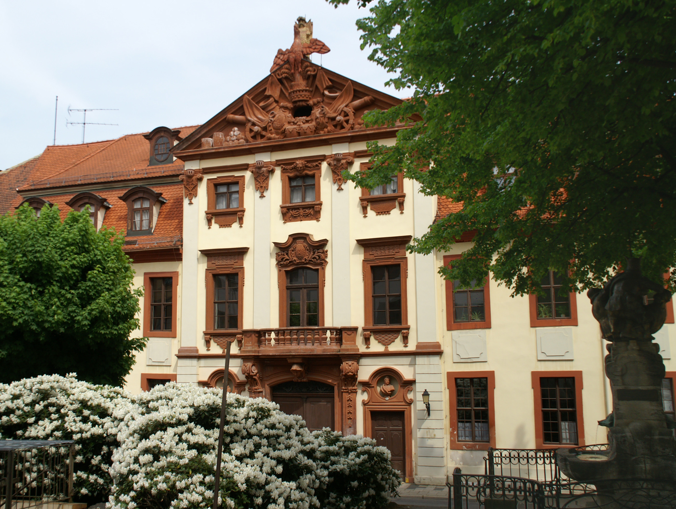 Seckendorfpalais in Altenburg, Germany